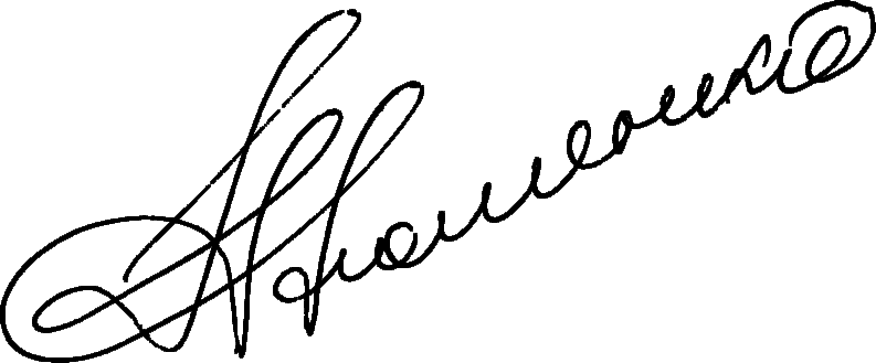 Роспись Президента Украины Петра Порошенко